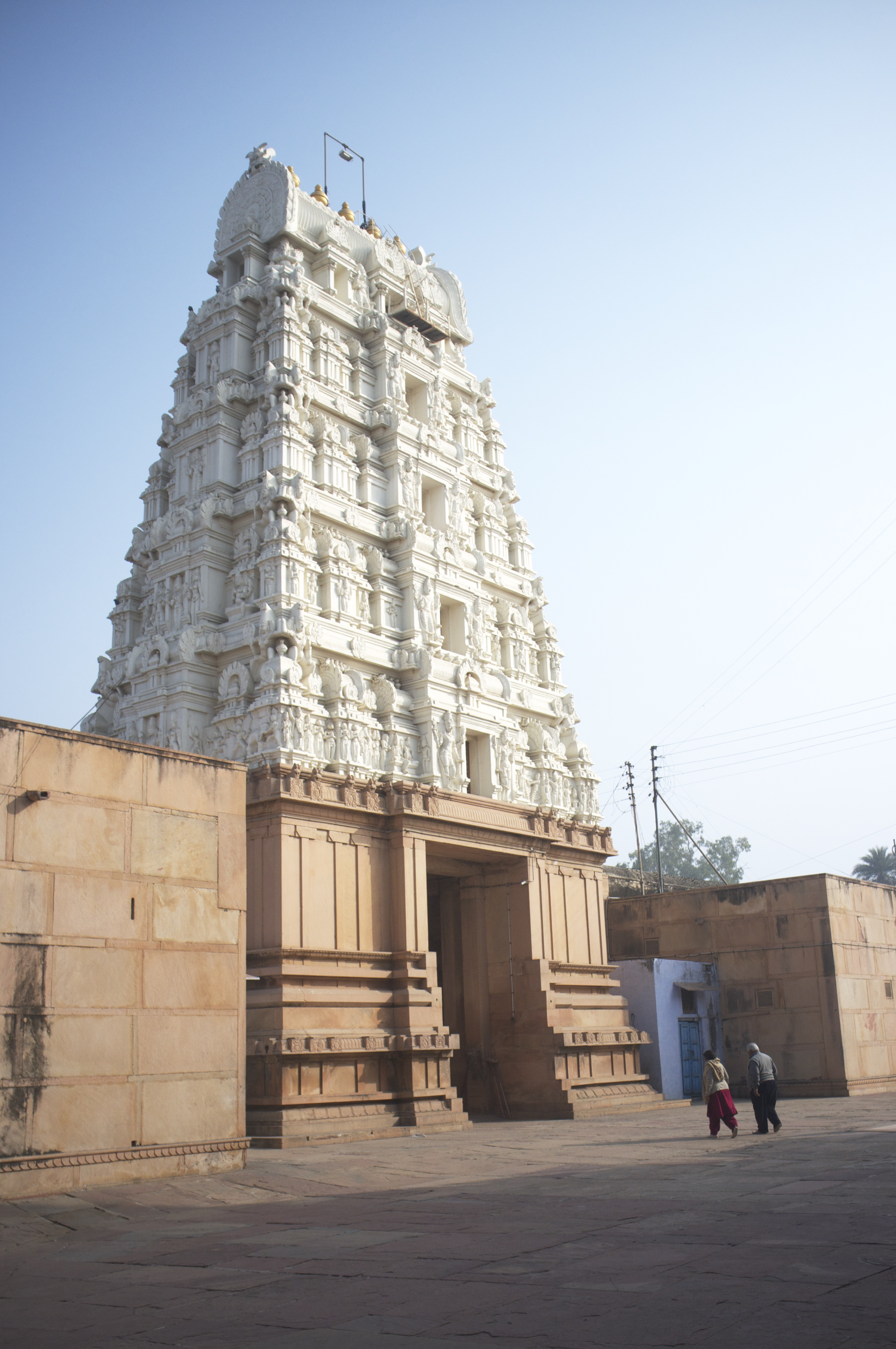 Vrindavan, India